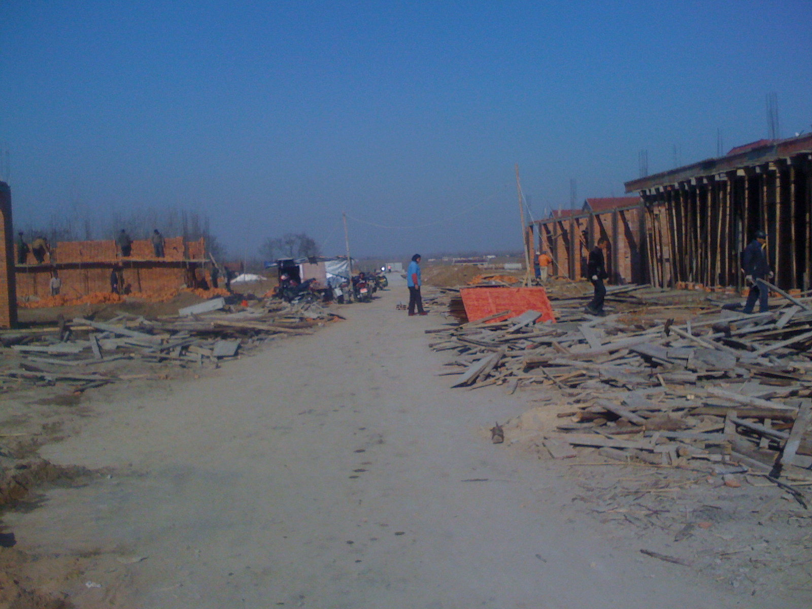 义和中学西，新建中的街道